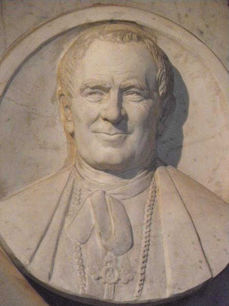 Stèle funéraire de Mgr Maurin. Chapelle des archevêques de la primatiale St-jean de Lyon (69).